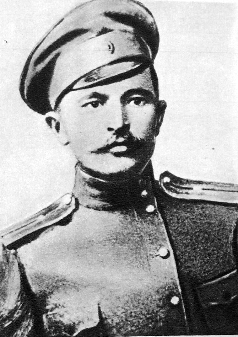 Прокопьев Максим Прокопьевич, удмуртский педагог, революционер-большевик, поэт и переводчик